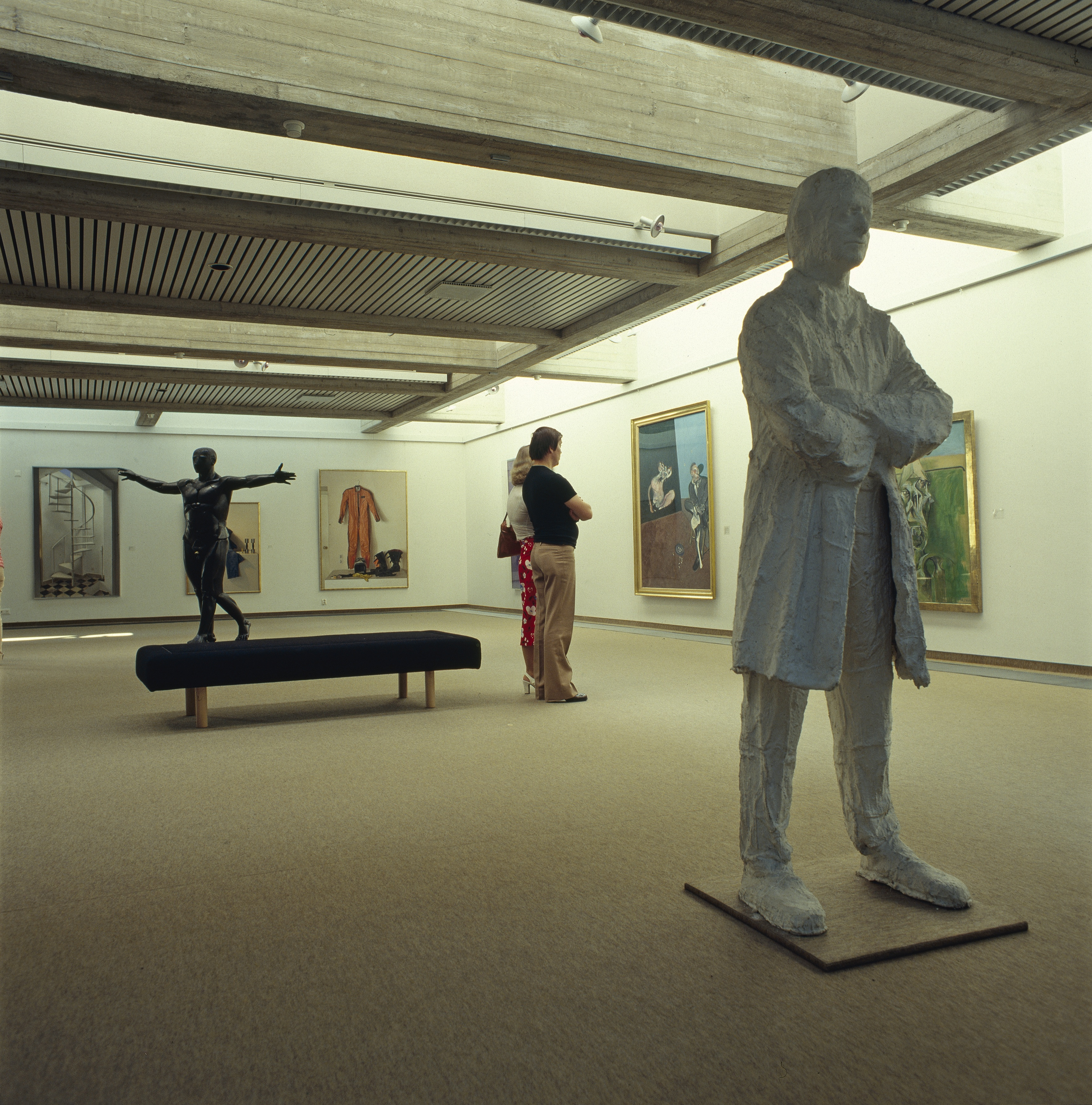 Taidenäyttely Sara Hildénin taidemuseossa Tampereella. Ajoittamaton valokuva.